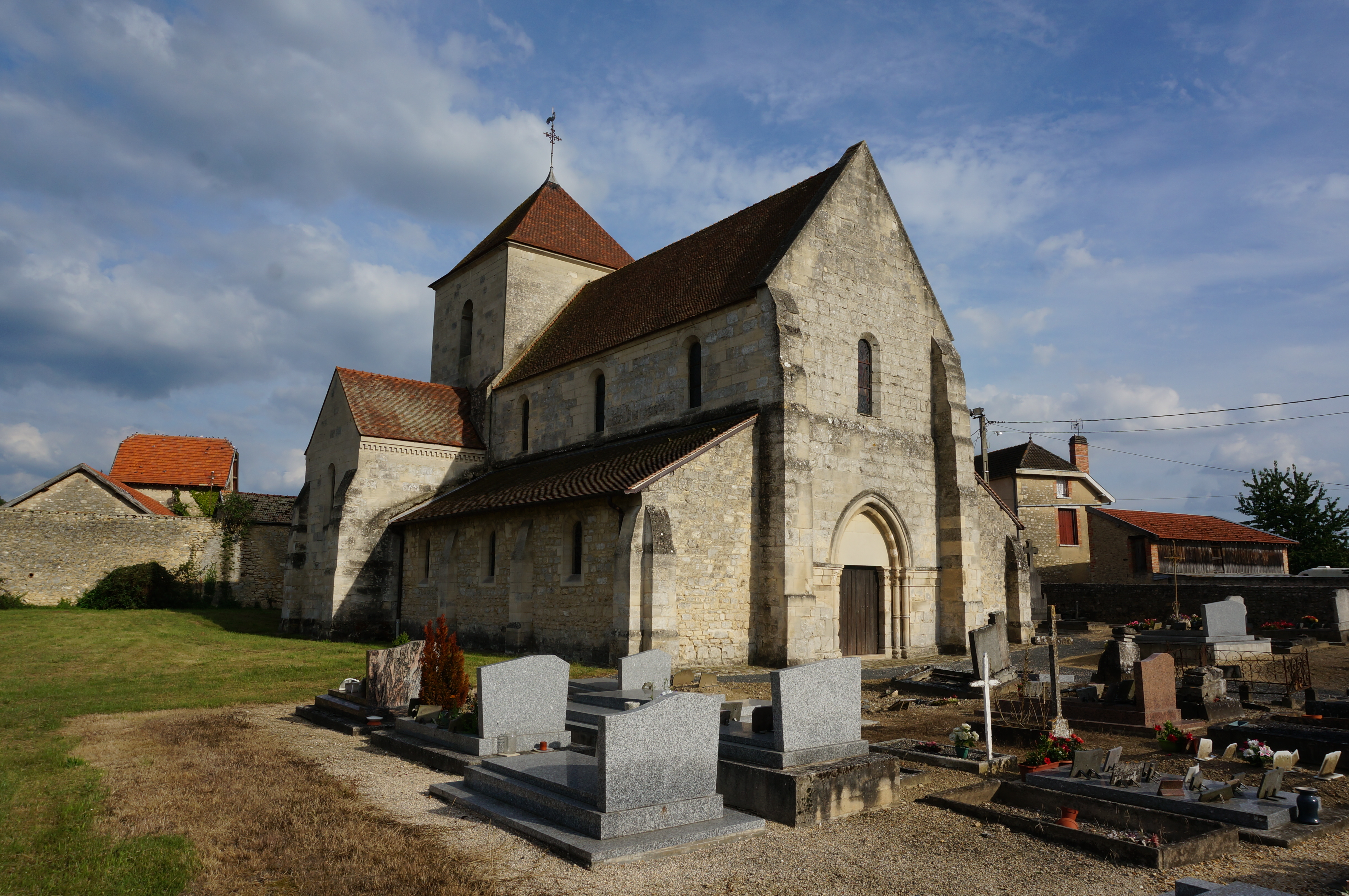 à Breuil (Marne).